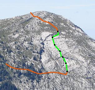 Voie d'escalade dans les dalles orientales du Charmant Som